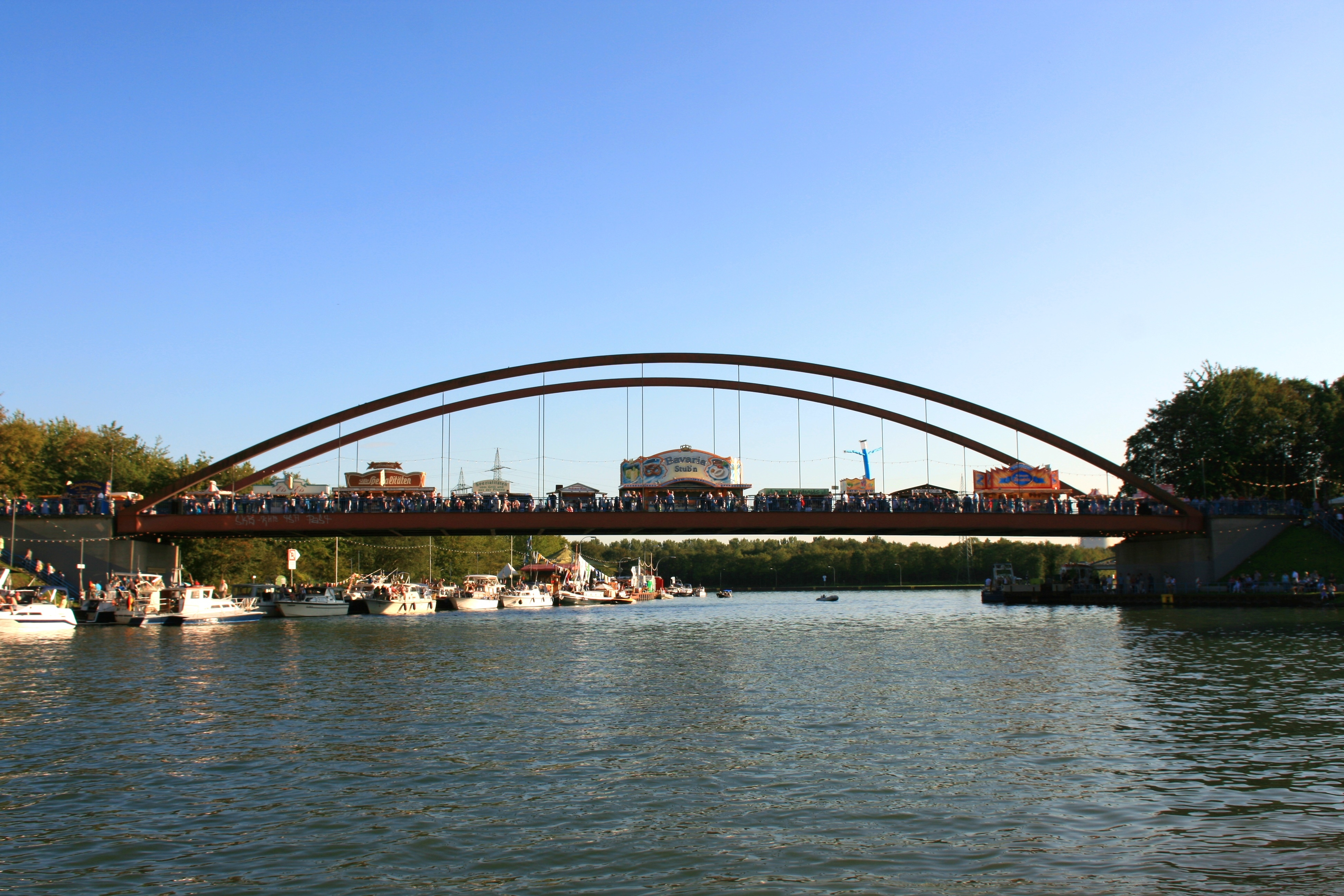 Hafenbrücke (Hafenstraße) über den Dortmund-Ems-Kanal beim Kanalfestival 2011 in Datteln